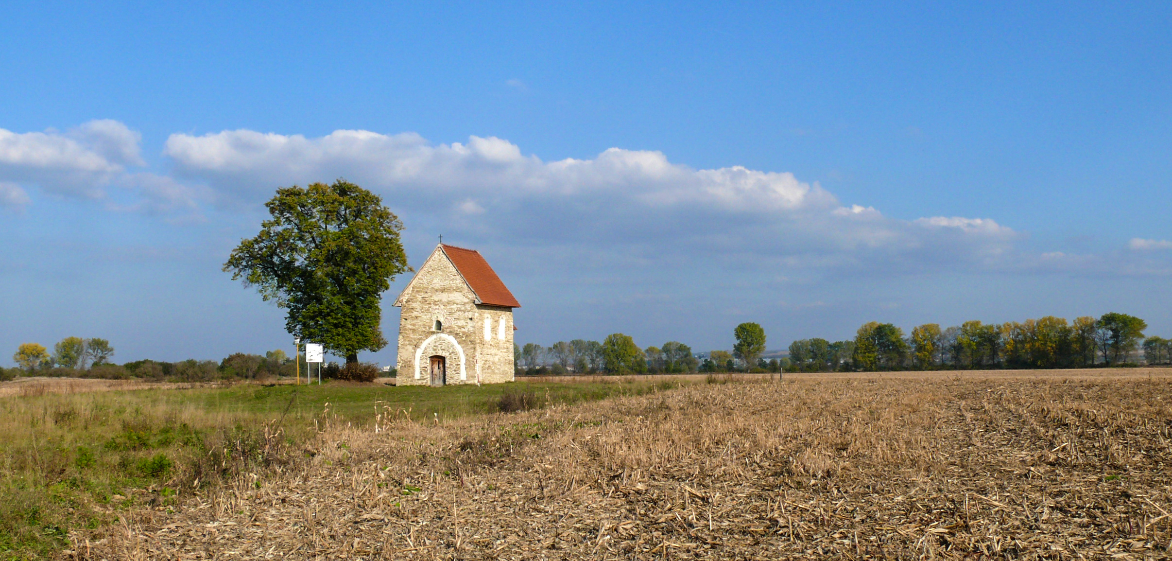 Kaplnka sv. Margity Antiochijskej, Kopčany